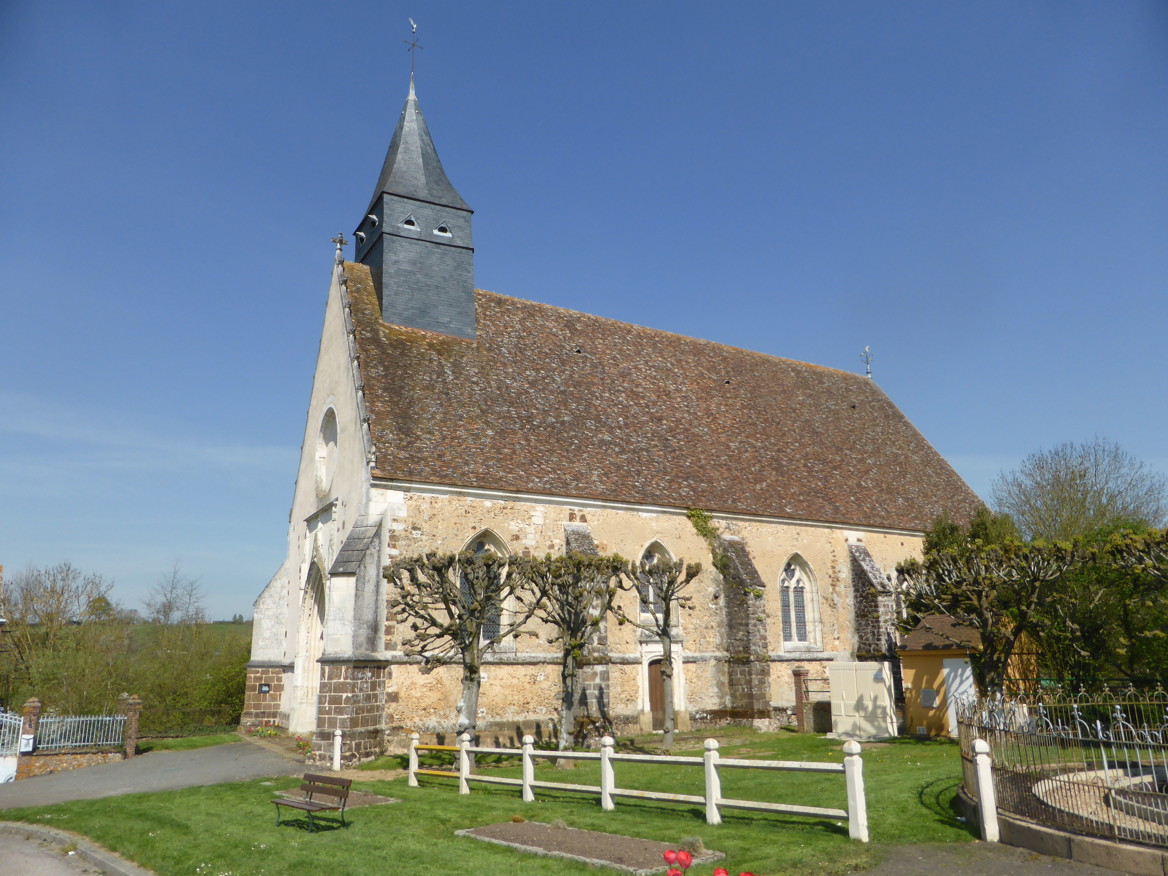 Église Notre-Dame de Combres, en Eure-et-Loir.